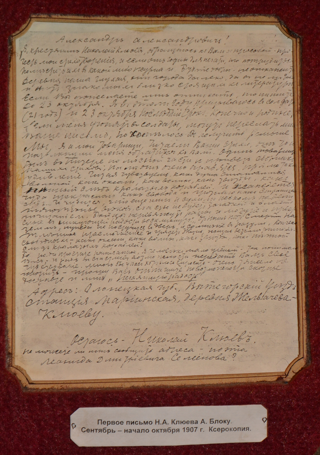 Première lettre adressée par Nikolaï Kliouïev à Alexandre Blok en 1907. Maison-musée Nikolaï Kliouïev de Vytegra